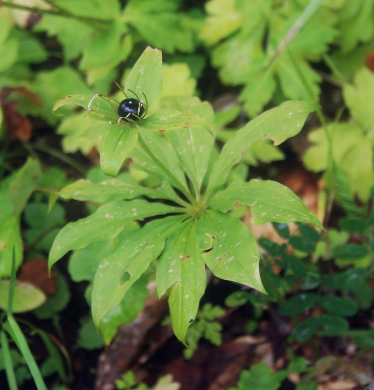 Paris incompleta, Germergewächse (Melanthiaceae) – Georgien/საქართველო: Kleiner Kaukasus, S Bakuriani/ბაკურიანი, ca. 1770 m s.m.